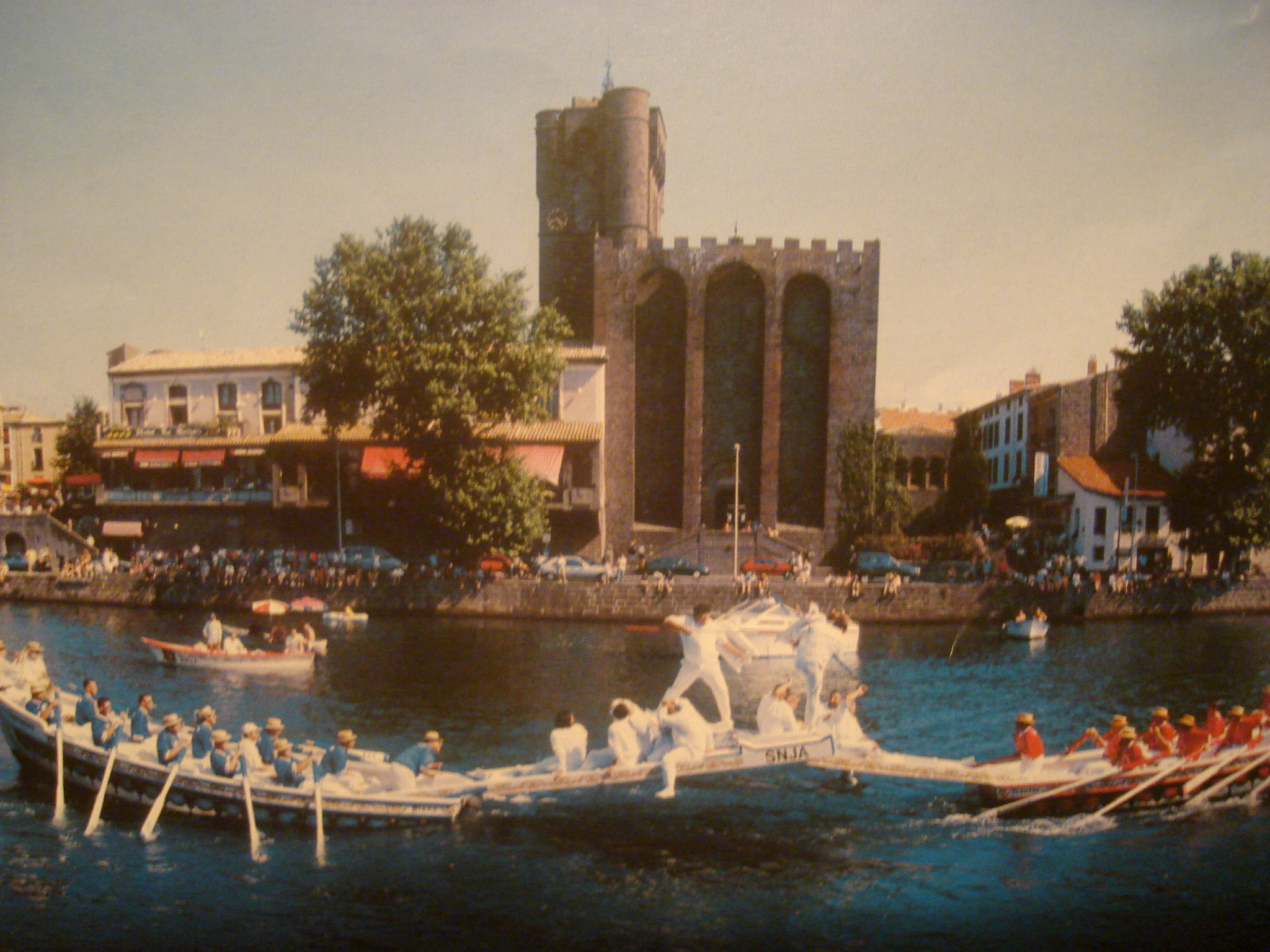 Agde (Hérault, France), Cathédrale Saint-Étienne et joutes sétoises sur l'Hérault.